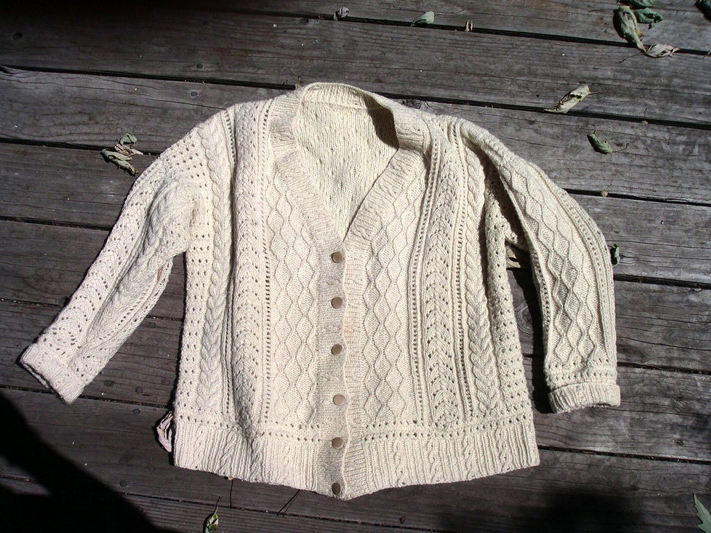 Made in 1996